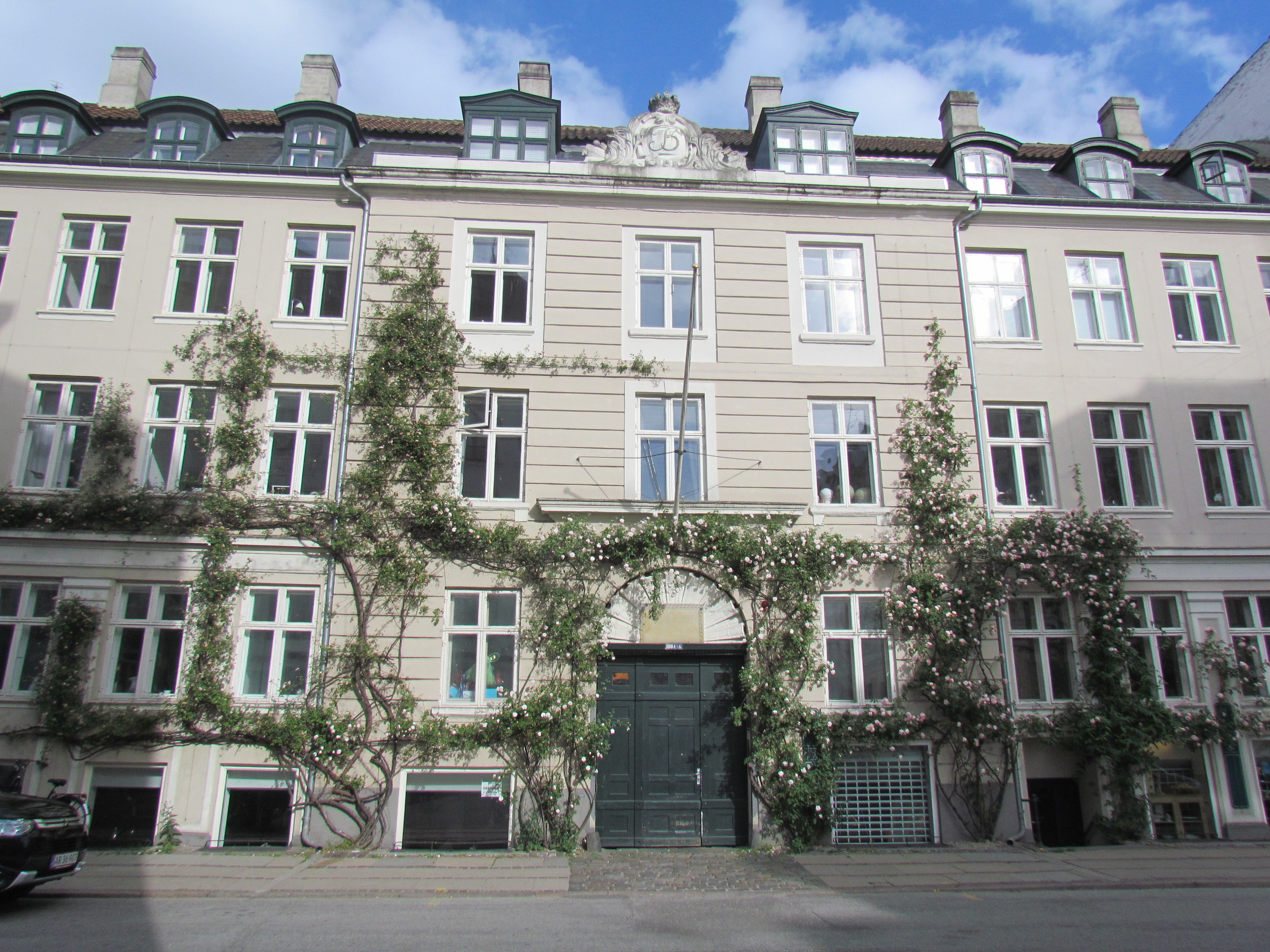 Christians Plejehus in Store Kongensgade in Copenhagen, Denmark